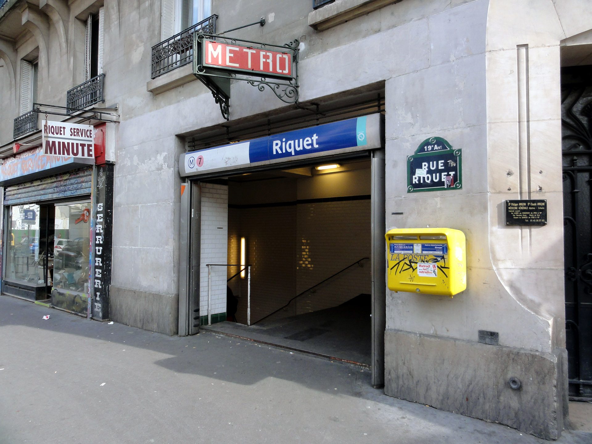 Entrée de la station Riquet de la ligne 7 du métro de Paris, France.